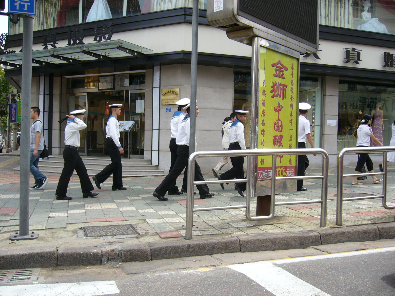 Русские моряки на улицах Циндао, 2005 год